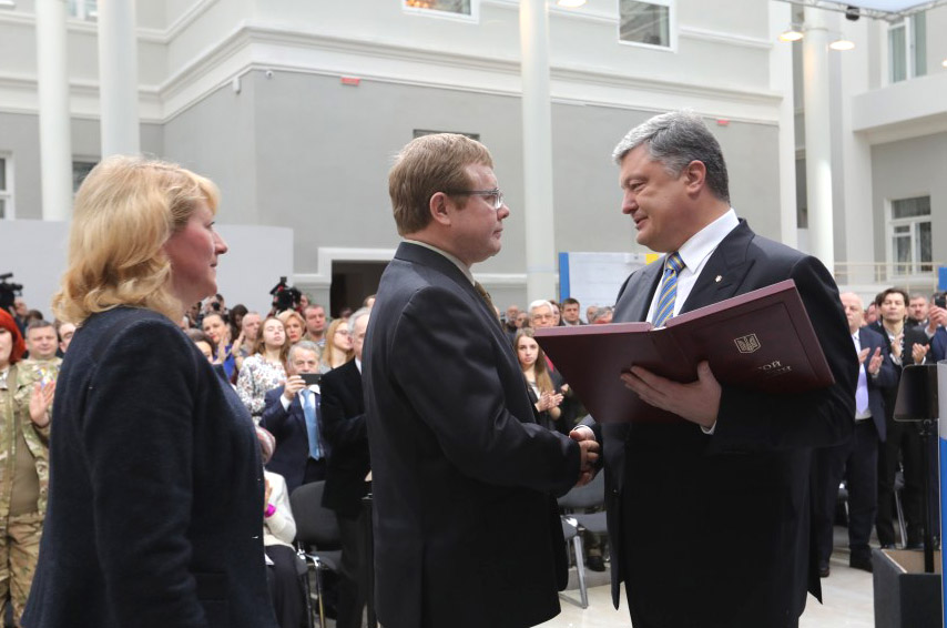 Президент присвоїв звання Герой України Володимиру Жемчугову